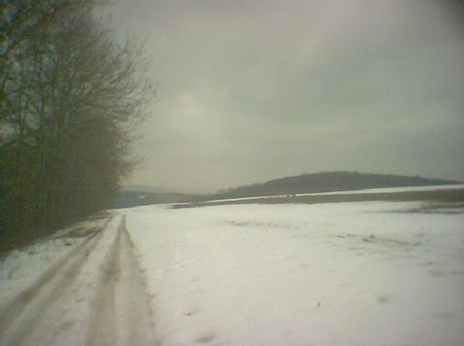 Bacín 499 m.n.n